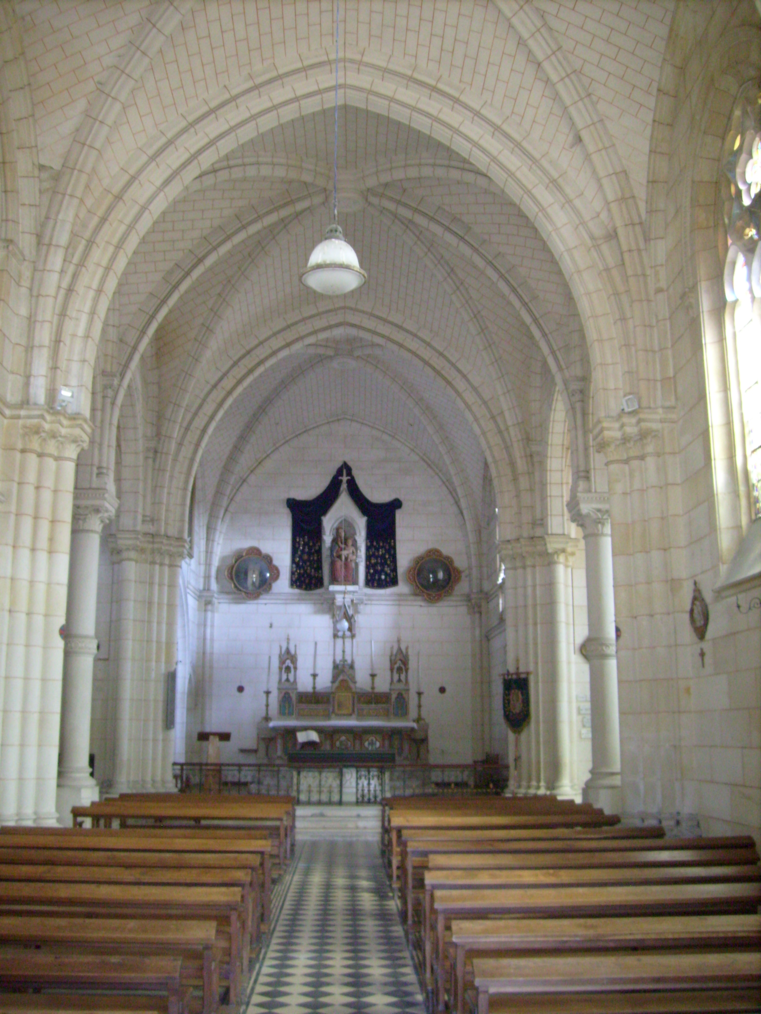 L'église Notre-Dame-de-Recouvrance à Saintes (intérieur)